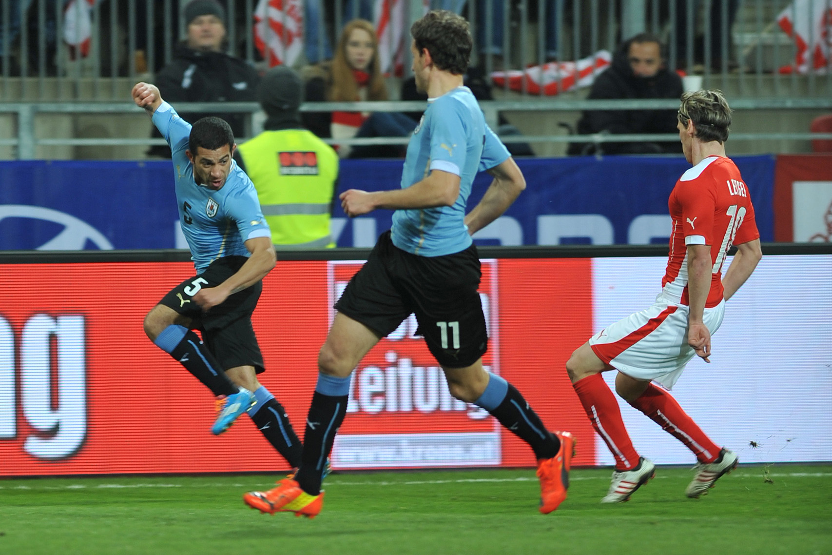 Freundschaftliches Länderspiel Österreich - Uruguay am 5. März 2014 in Klagenfurt: Walter Gargano